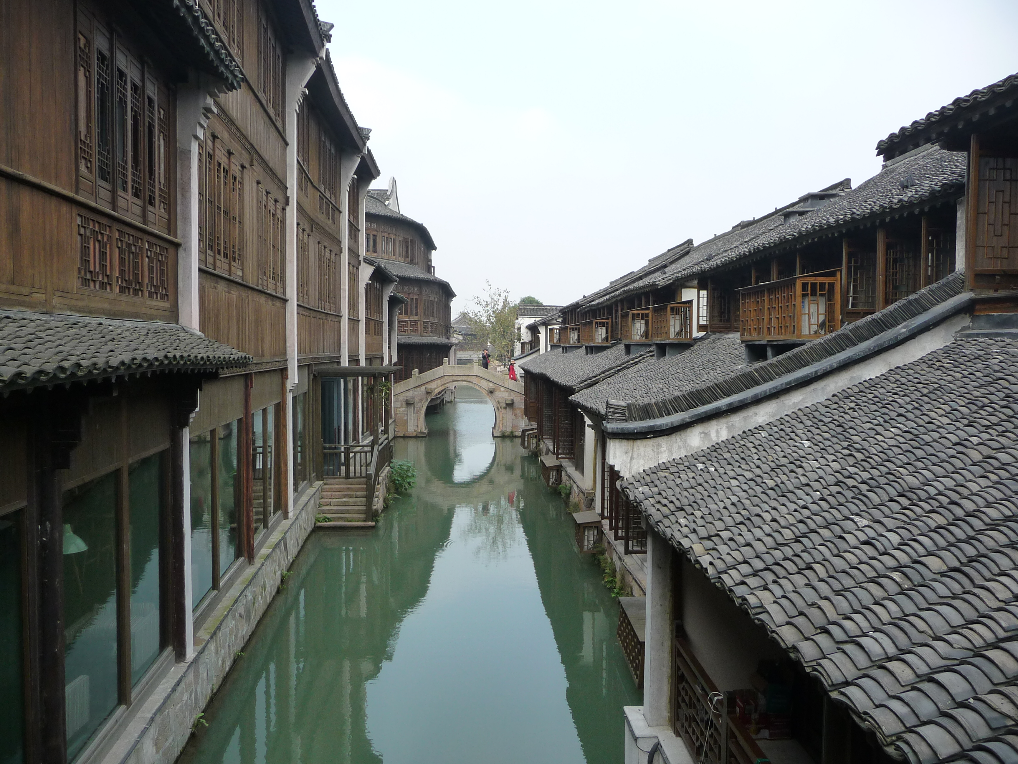 Brücke im ostchinesischen Touristenstädchen Wuzhen, Provinz Zhejiang